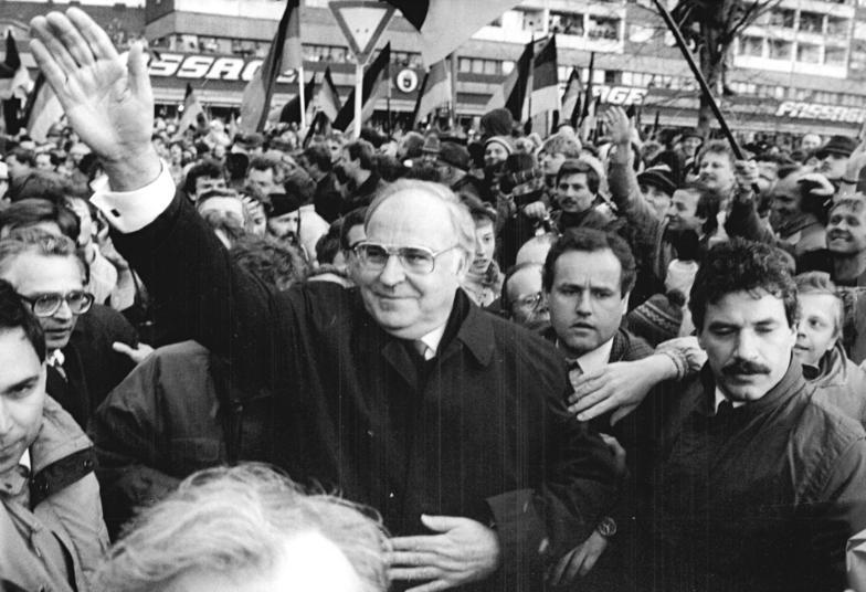 ADN-ZB Kasper 1.3.90 Karl-Marx-Stadt: Mit einem Meer von schwarz-rot-goldenen und grün-weißen Fahnen begrüßten Zehntausende Bürger den Bundeskanzler und Vorsitzenden der CDU der BRD, Helmut Kohl, der auf einer Wahlkundgebung der "Allianz für Deutschland" sprach."